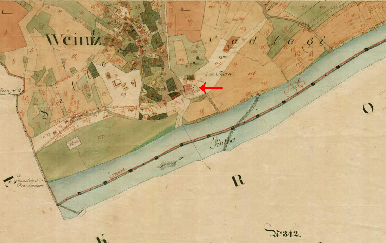 Franciscejski kataster za Kranjsko, 1823-1869